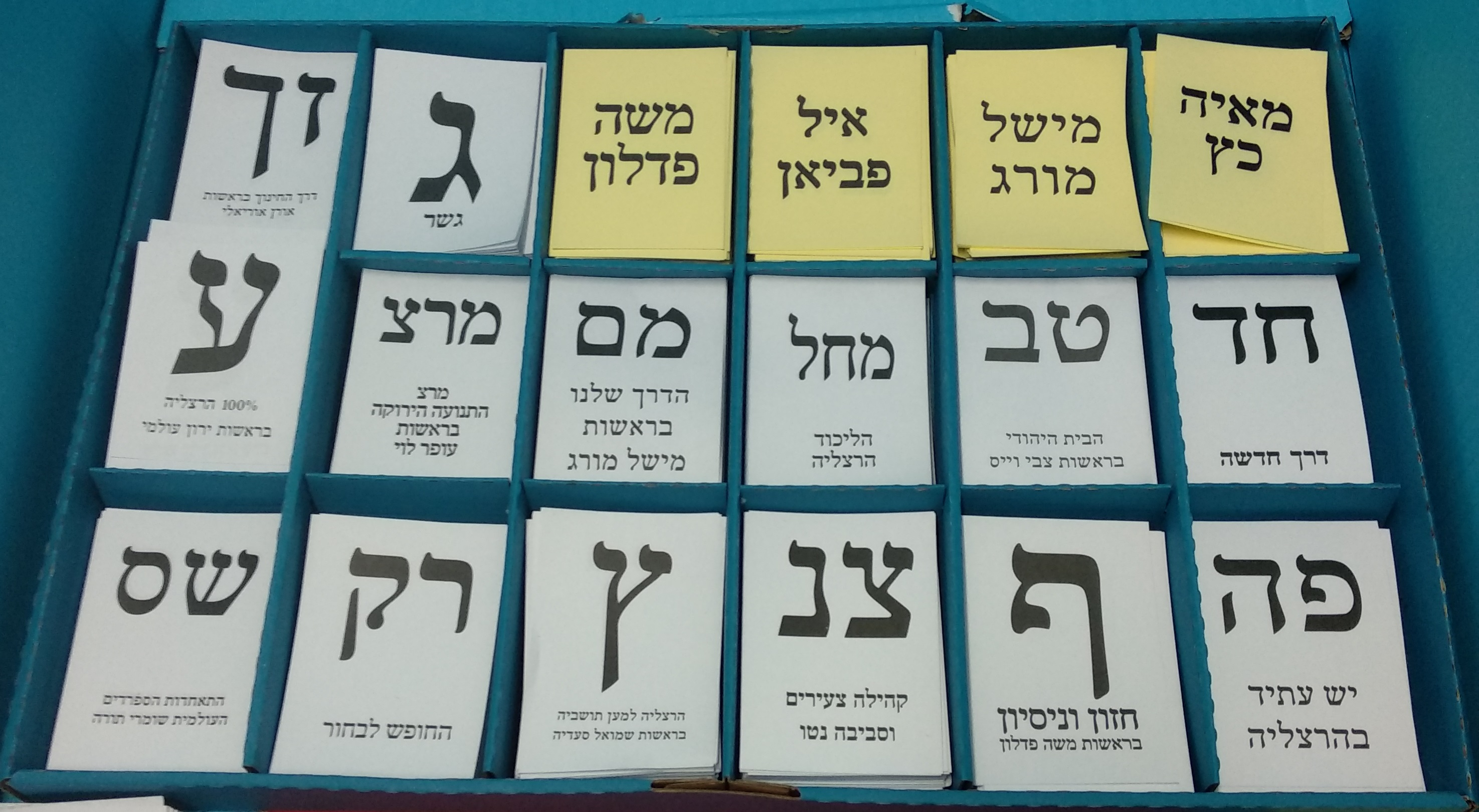 פתקי הצבעה בבחירות לעיריית הרצליה, 2018